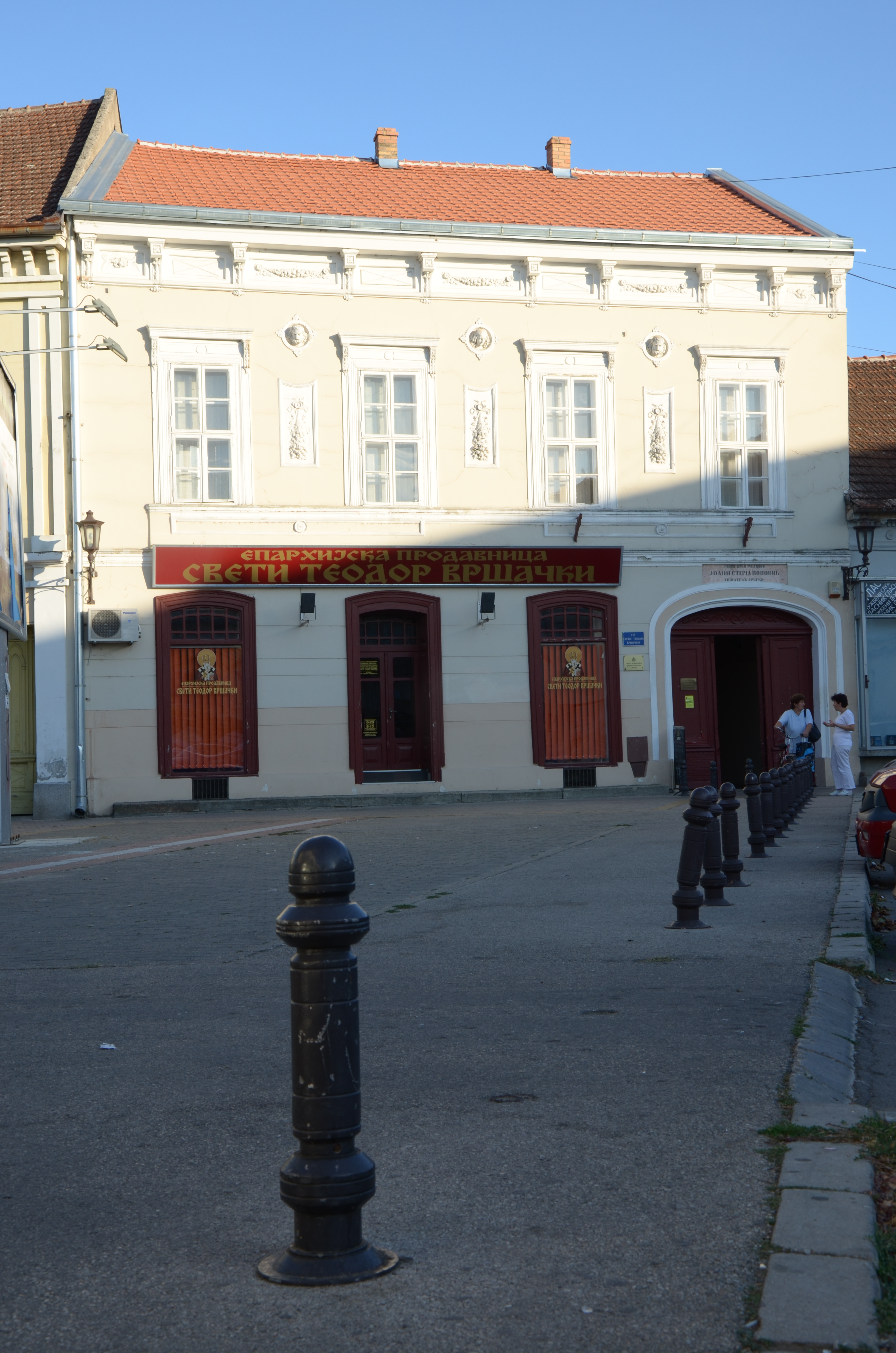 Родна кућа Јована Стерије Поповића у Вршцу